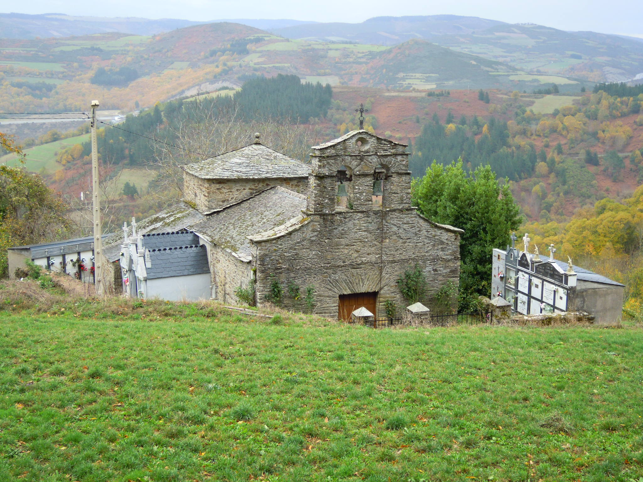 Igrexa parroquial de Quintá (As Nogais).